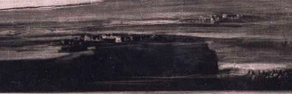 Francisco de Goya, El Gigante o El Coloso (1814-1818), estampa suelta sobre papel verjurado a la aguatinta bruñida. Detalle: paisaje urbano.